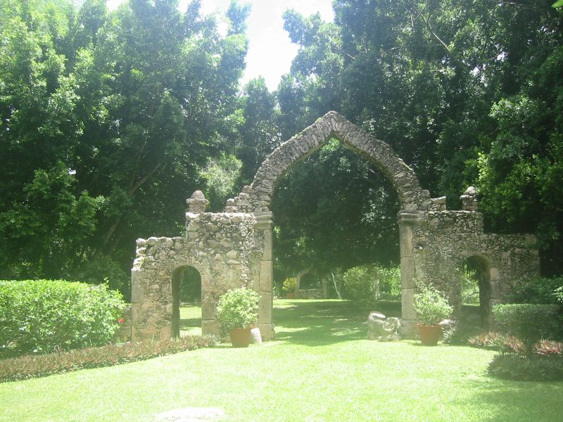 Hacienda Chichén YucatanHoneymoon_170